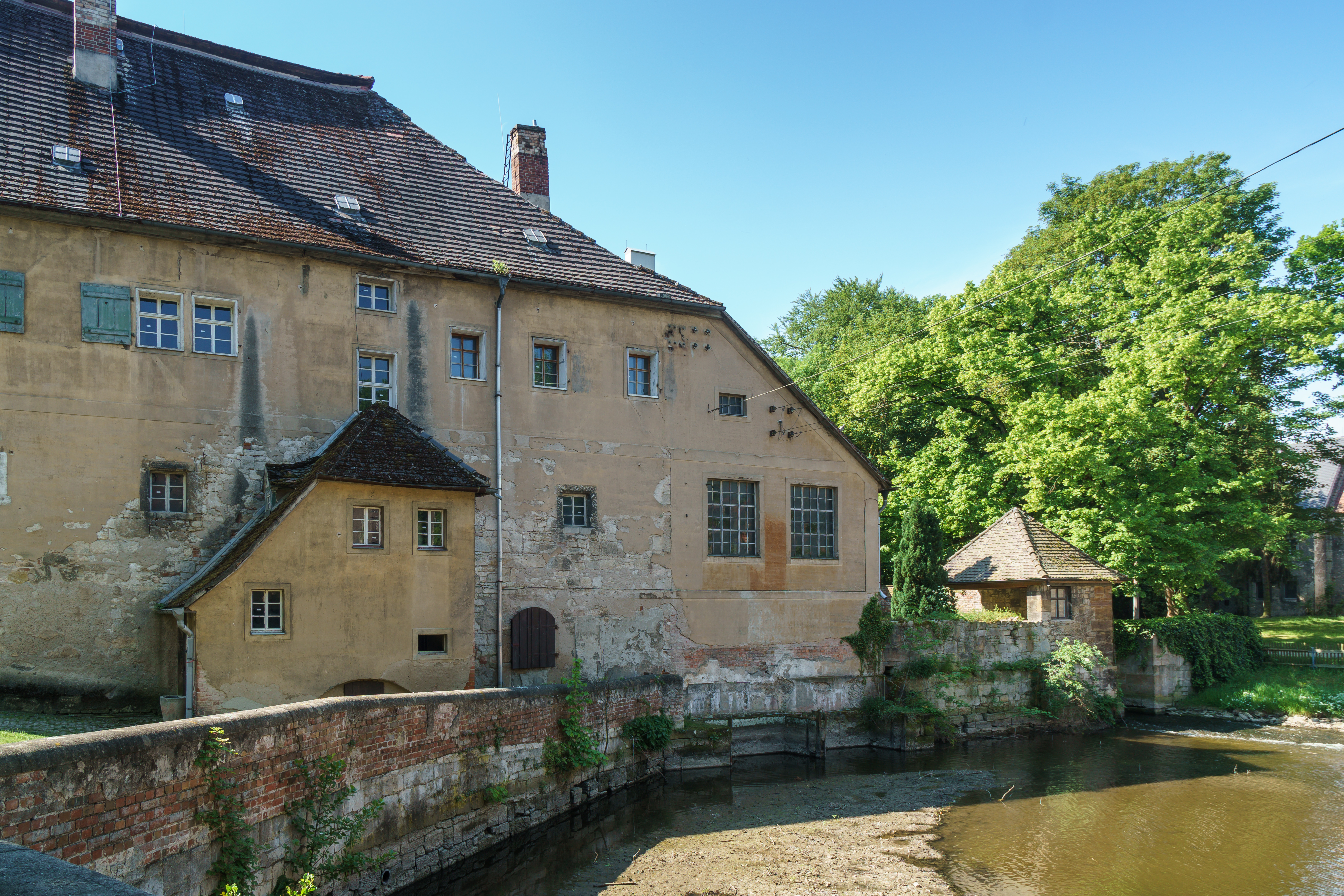 Panstermühle neben der Kleinen Saale, im Kloster Schulpforta, Schulstraße 11 in Naumburg OT Schulpforte